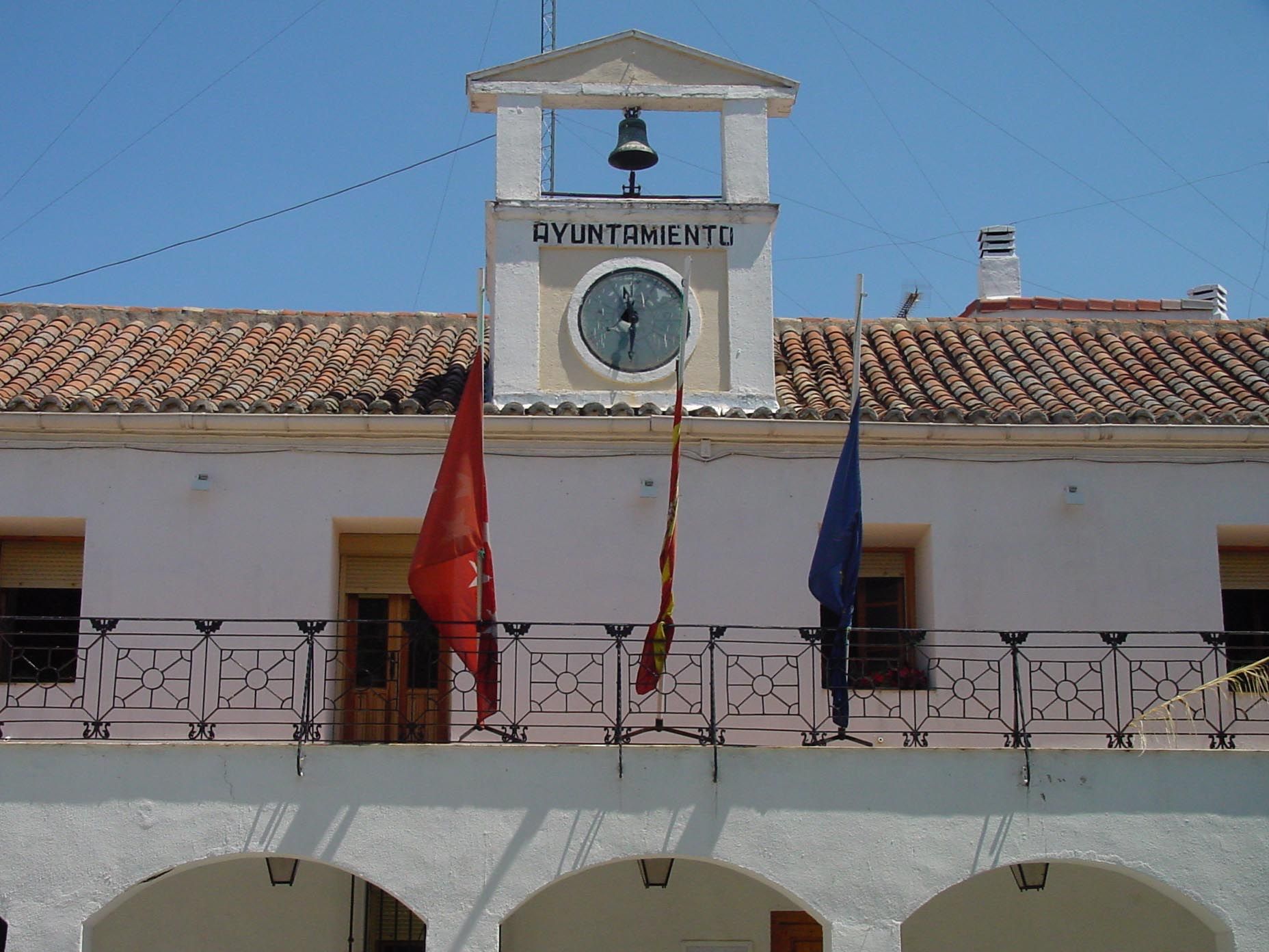 Ayuntamiento de Parla.